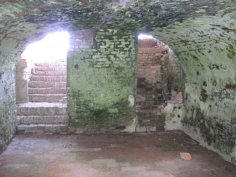 Burgstall Dasing (Landkreis Aichach-Friedberg, Bayerisch-Schwaben). Der Keller der Hauptburg. Blick nach Osten. Eigene Aufnahme, Nov. 2007 / Former Dasing Castle near Augsburg (Bavaria, Germany). The cellar of the central castle, looking east. Own photo, Nov. 2007